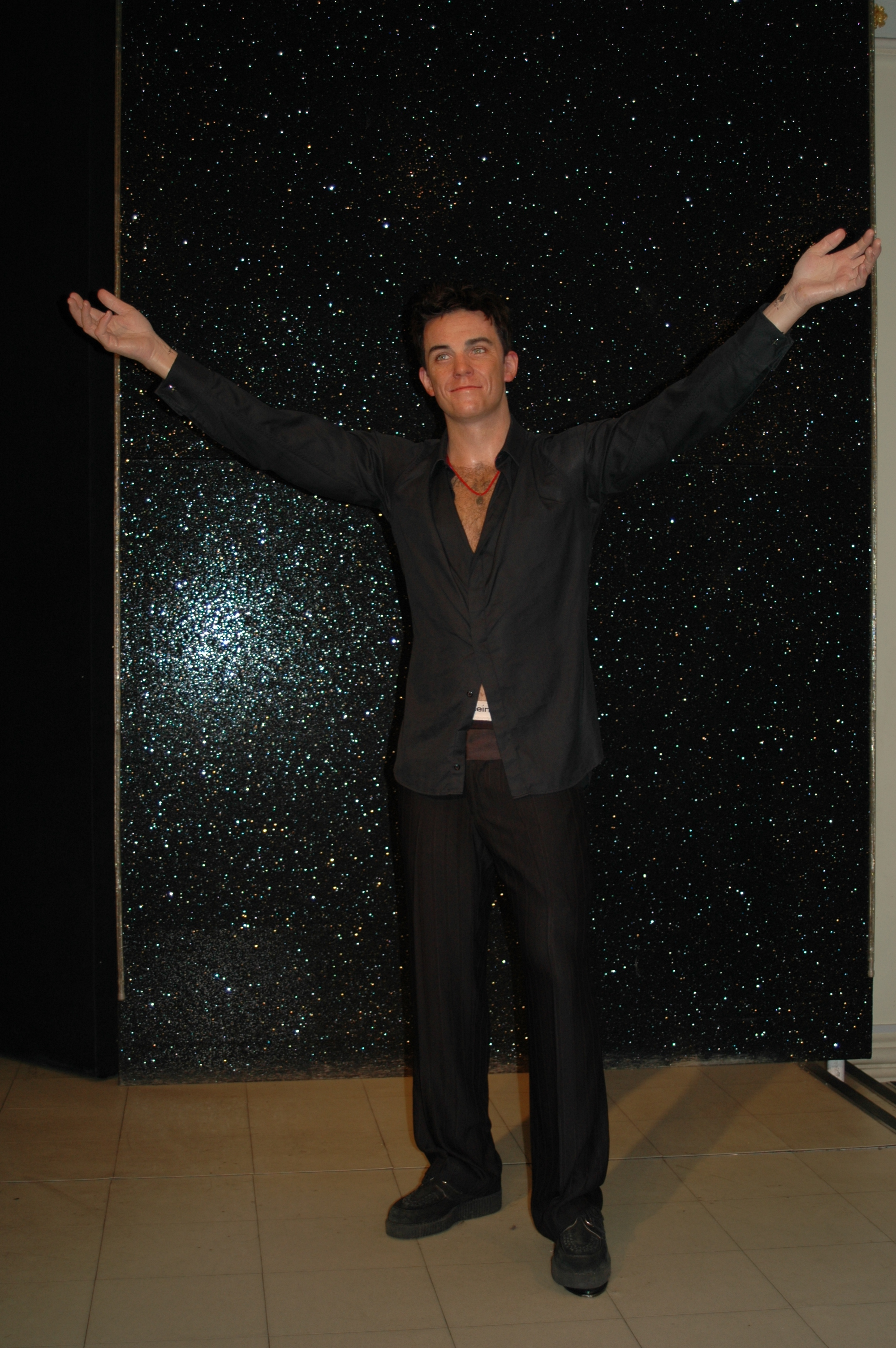 Estatua de cera del cantante Robbie Williams, en el museo Madame Tussauds, en Londres.